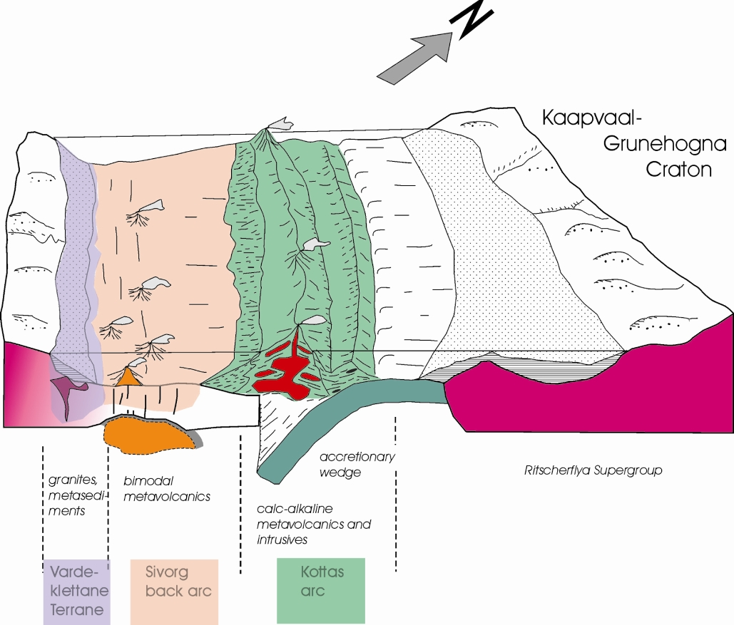 Geologisches Modell für die Heimefrontfjella